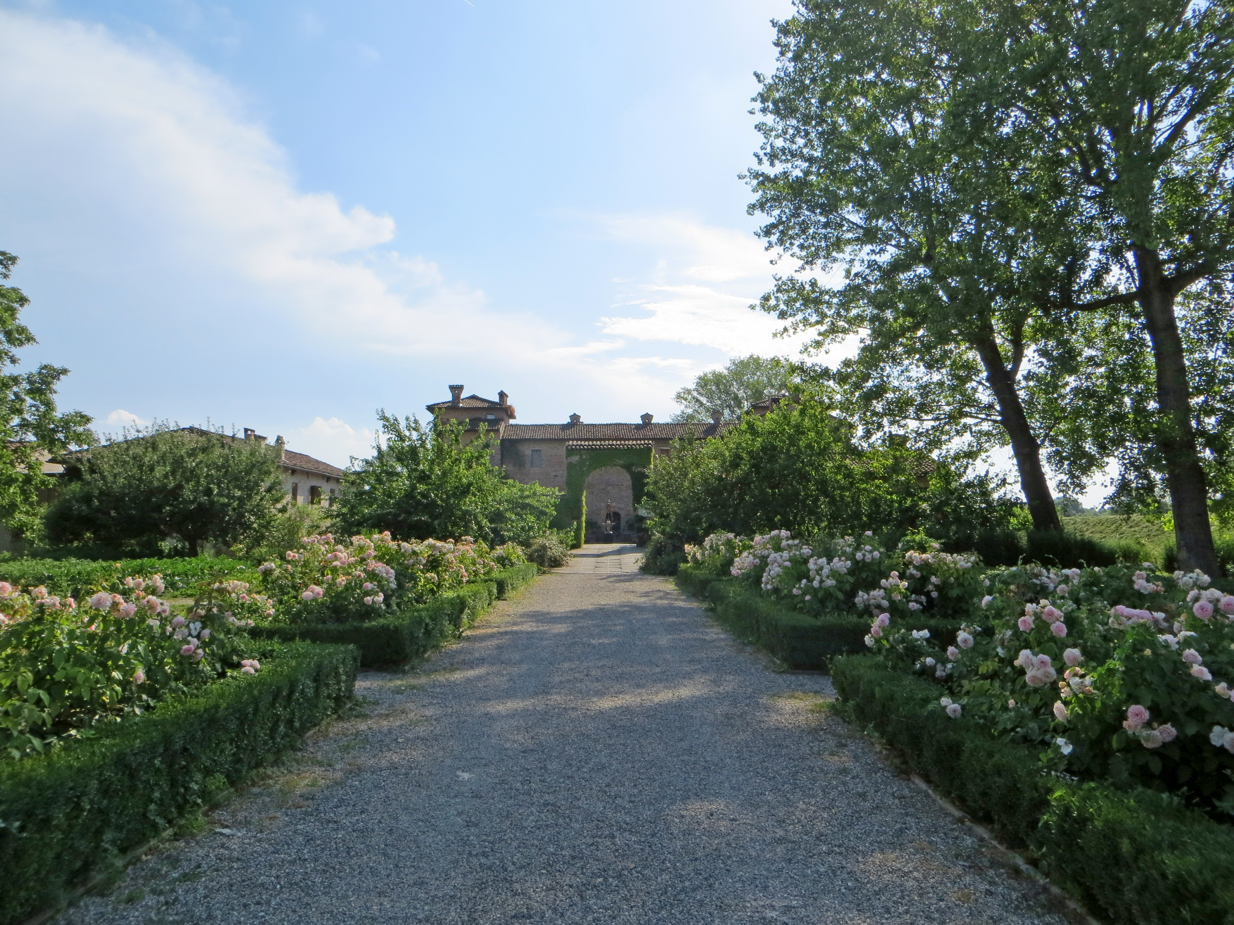 Antica Corte Pallavicina (Polesine Parmense) - vialetto di accesso alla corte